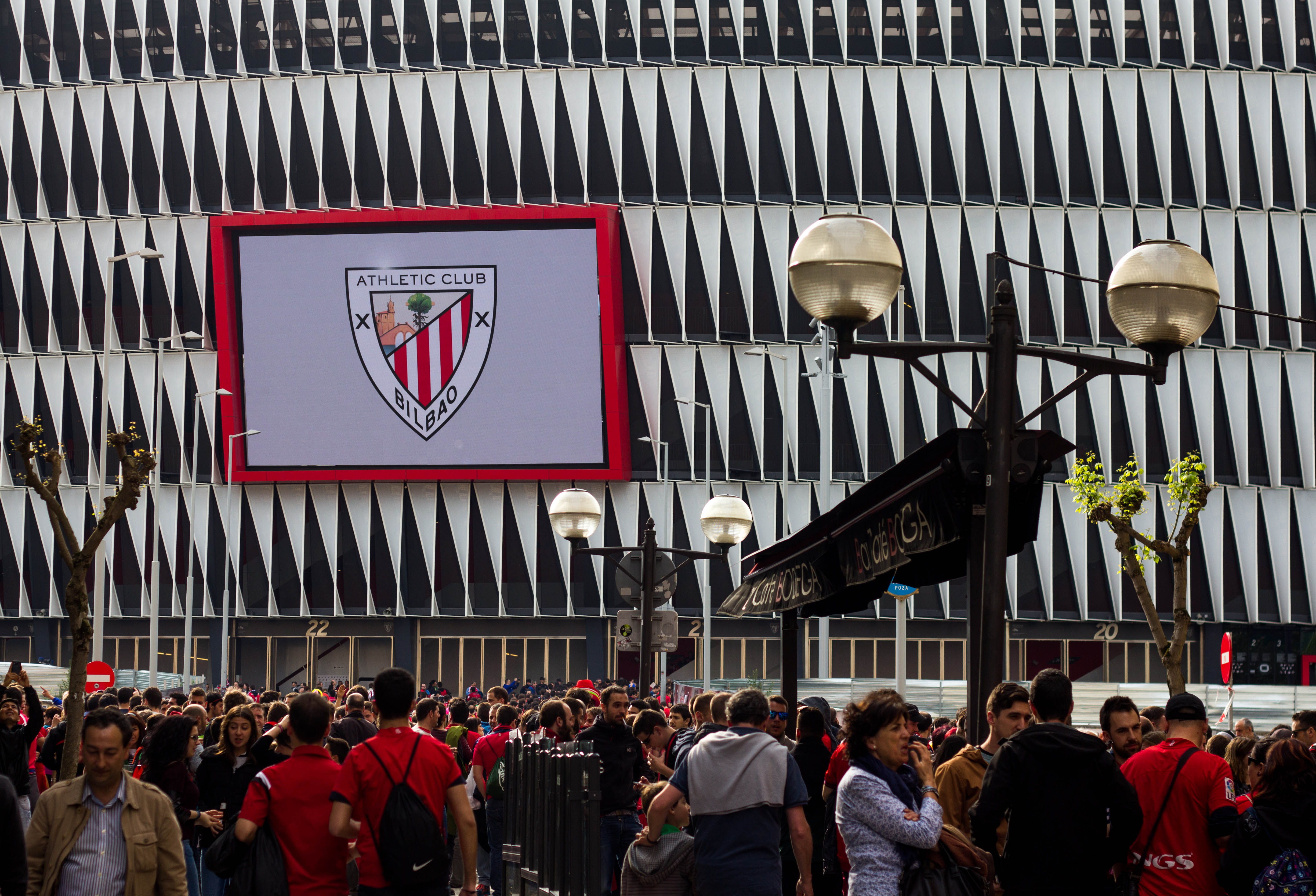 San Mames